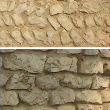 Descrizione del tipo di tessitura muraria nella chiesetta di San Zeno